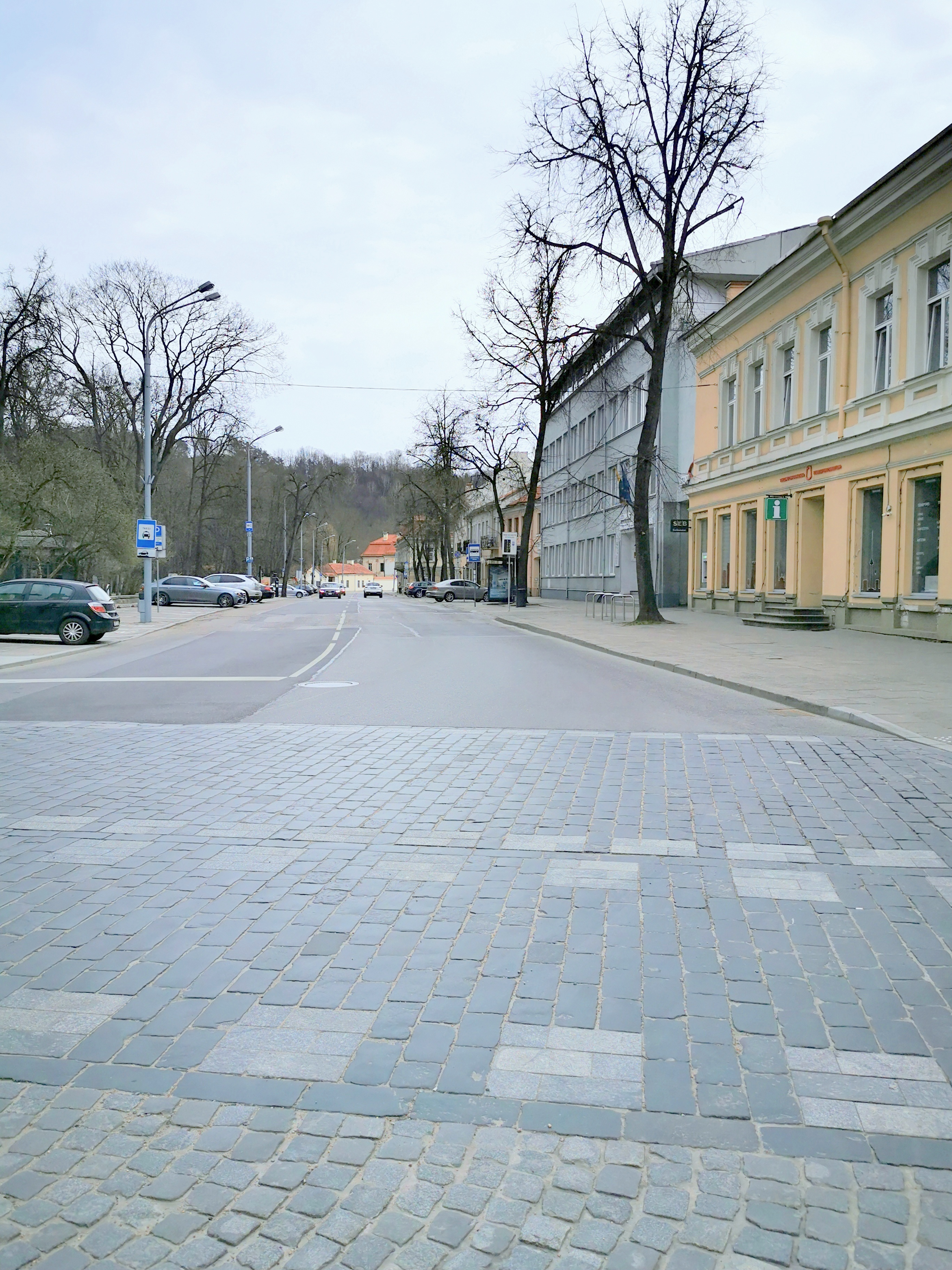 Barboros Radvilaitės gatvė